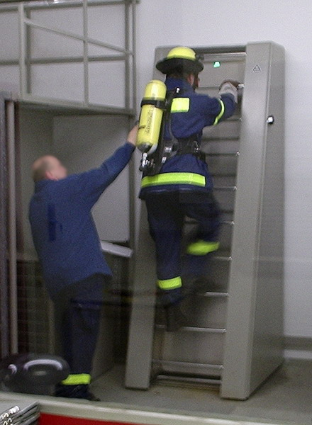 THW Atemschutzgeräteübung Atemschutz Endlosleiter